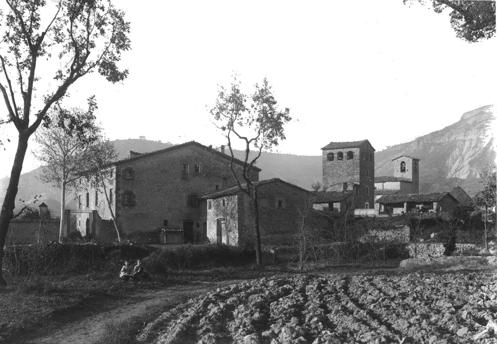 Vista general de Sant Joan del Galí amb dos nens. Lluís Vila i d'Abadal (Entre 1910 i 1936)